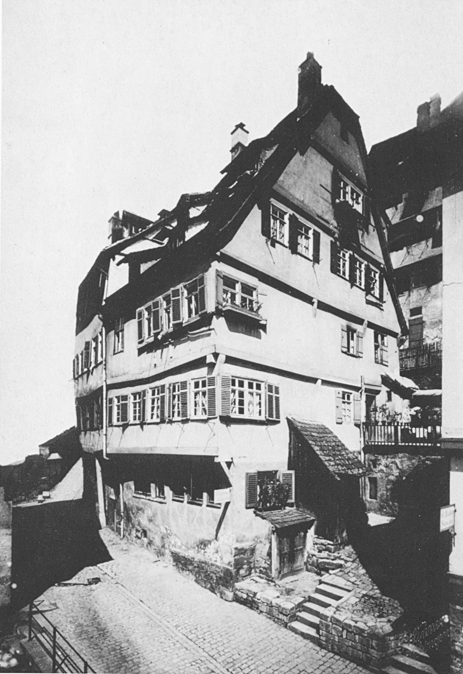 Tübingen, Clinicumgasse, Die Arche